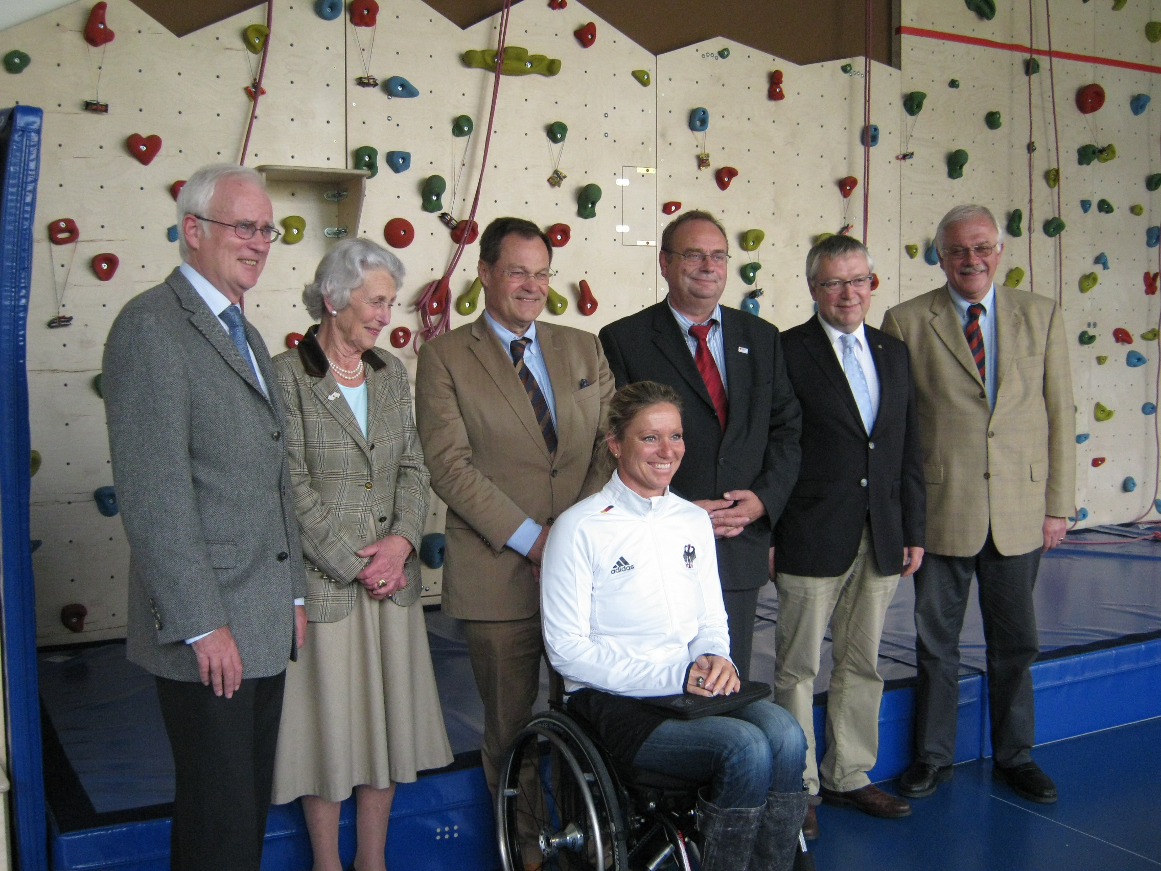 Einweihung der Therapiekletterwand im DRK-Schul- und Therapiezentrum Raisdorf